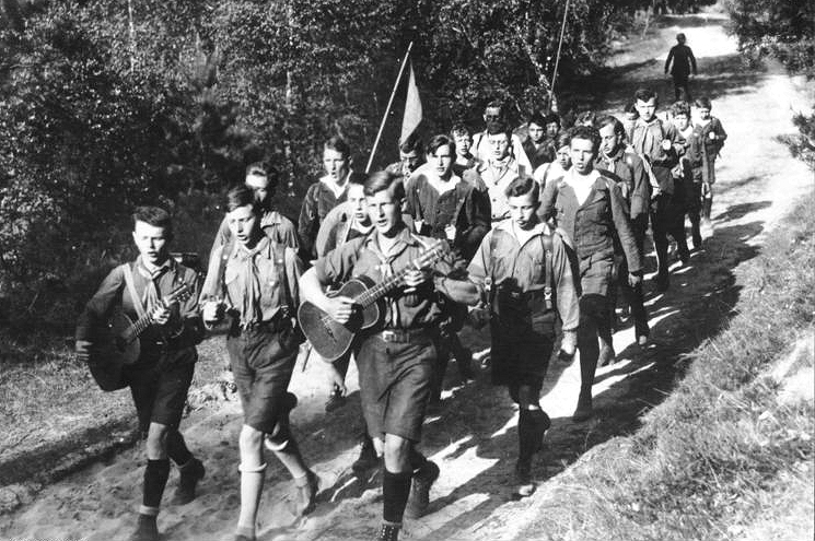 ADN-ZB/Archiv Deutschland Eine Gruppe des Steglitzer Wandervogels aus Berlin auf großer Fahrt. Aufn.: um 1930 [Scherl Bilderdienst]